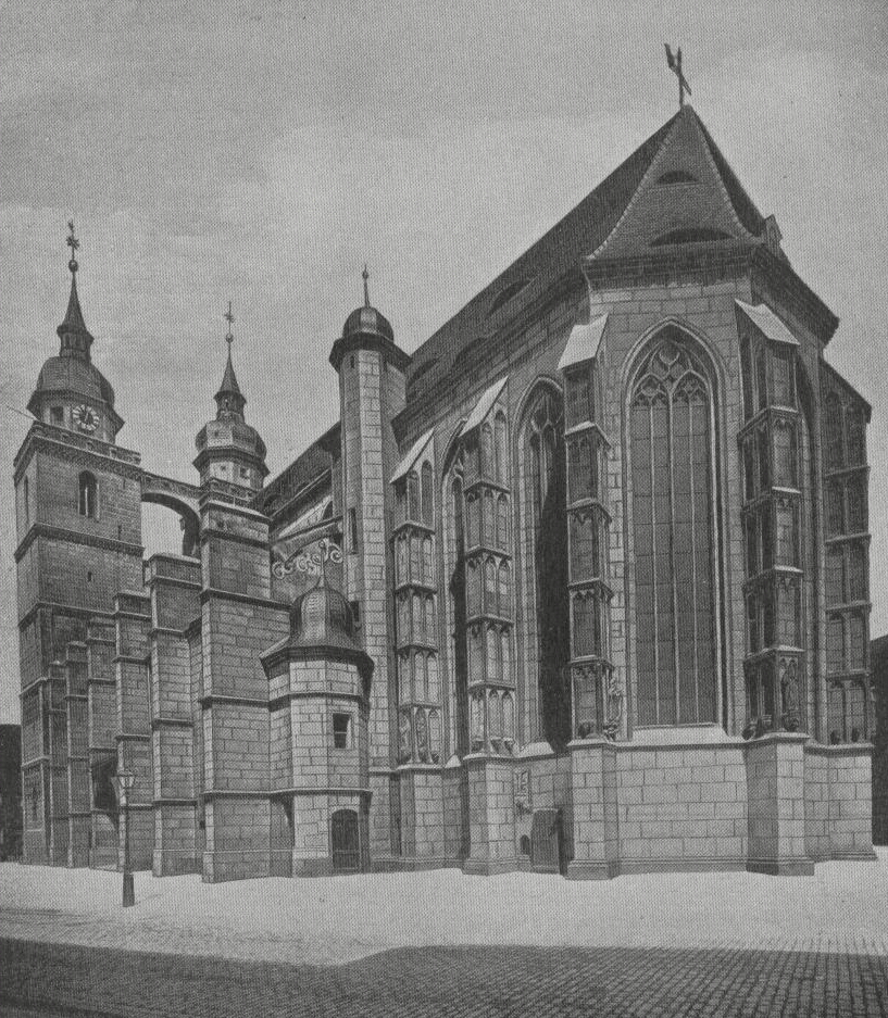 Stadtkirche Bayreuth - Seite 17, Abbildung 17, Untertitel: Stadtkirche. Choransicht.